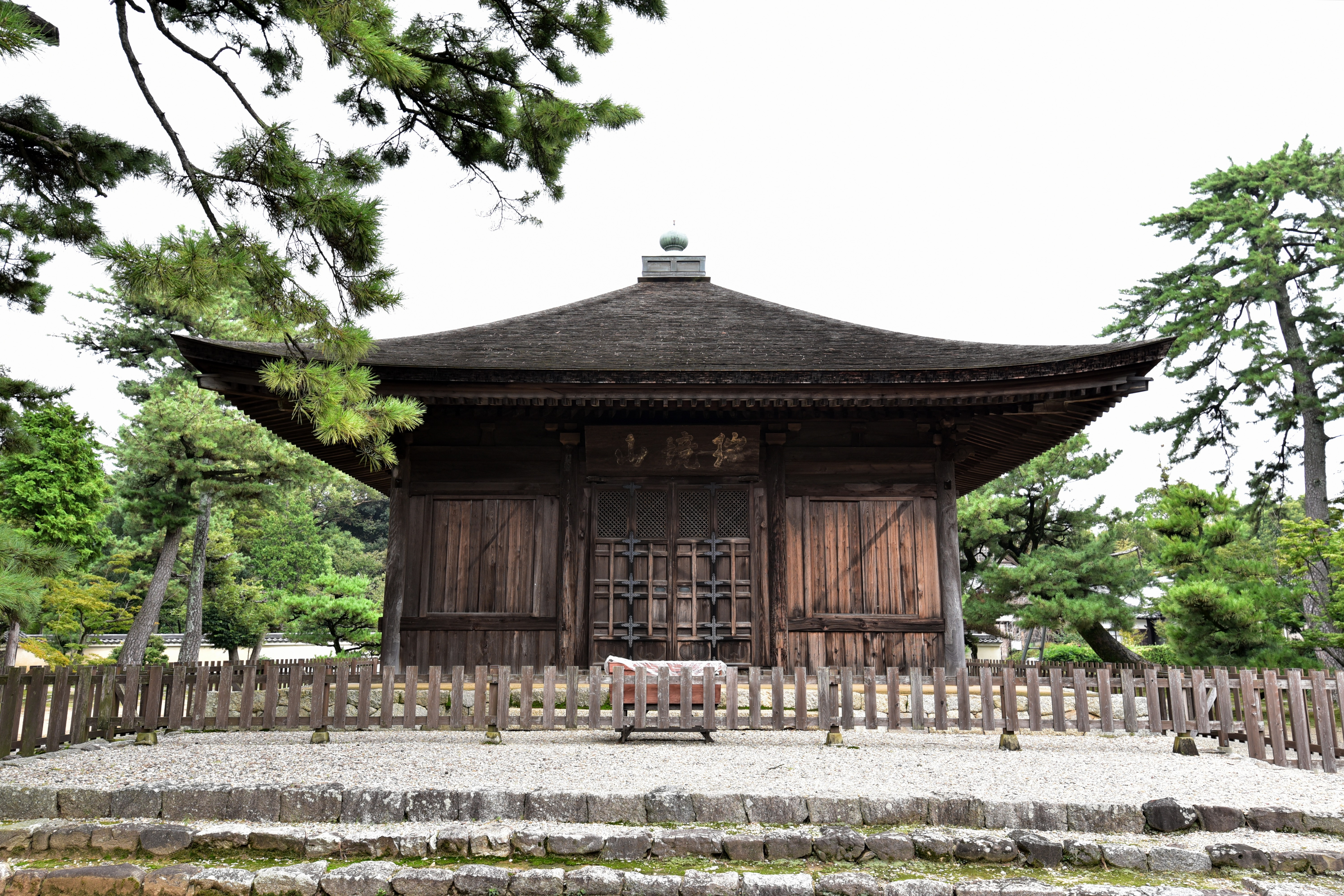 実相寺釈迦堂